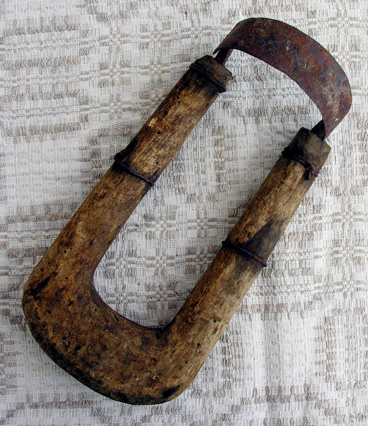 Lenkena 2006 m. liepos 31 d.